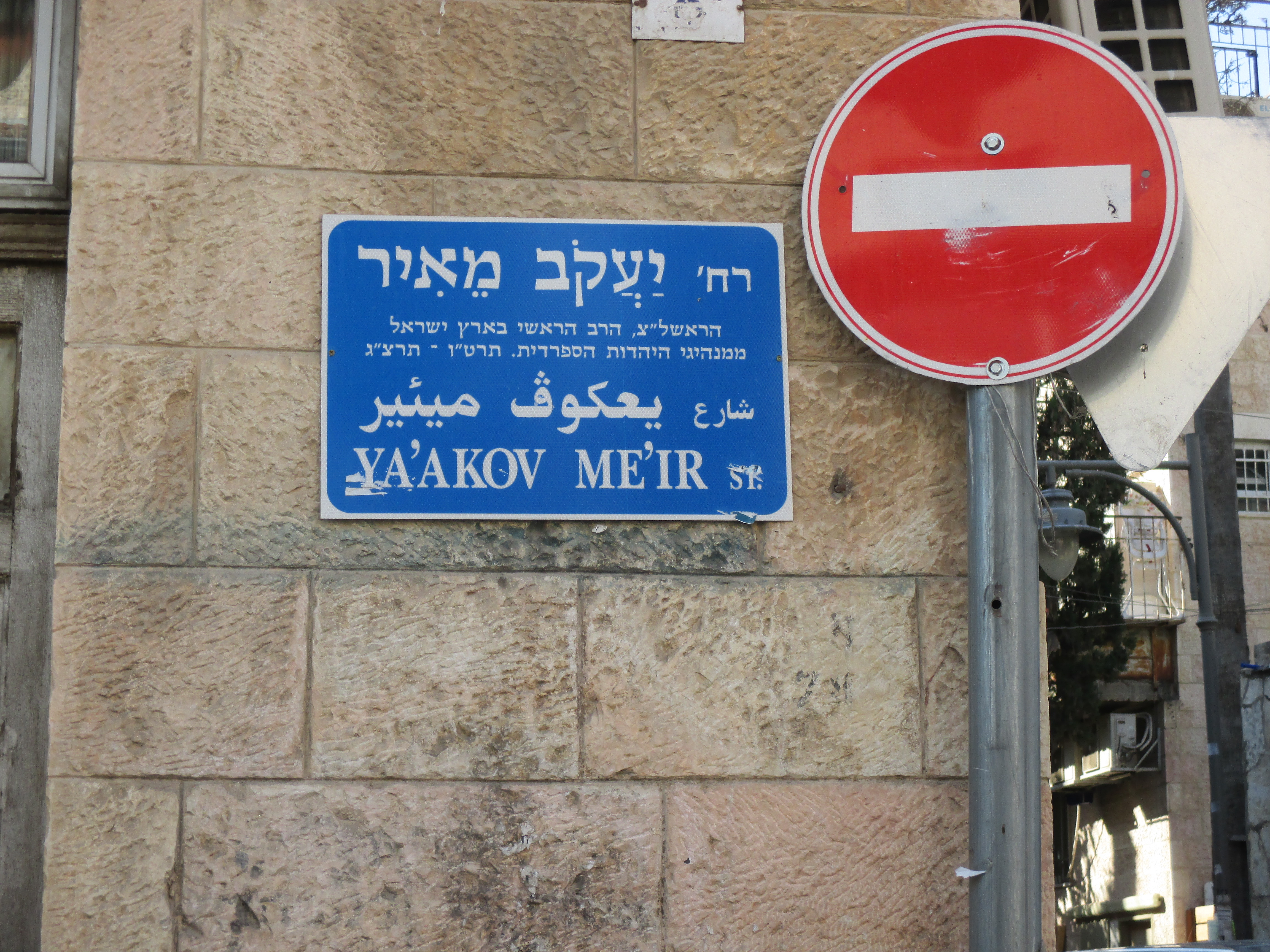 שלט רחוב יעקב מאיר בירושלים